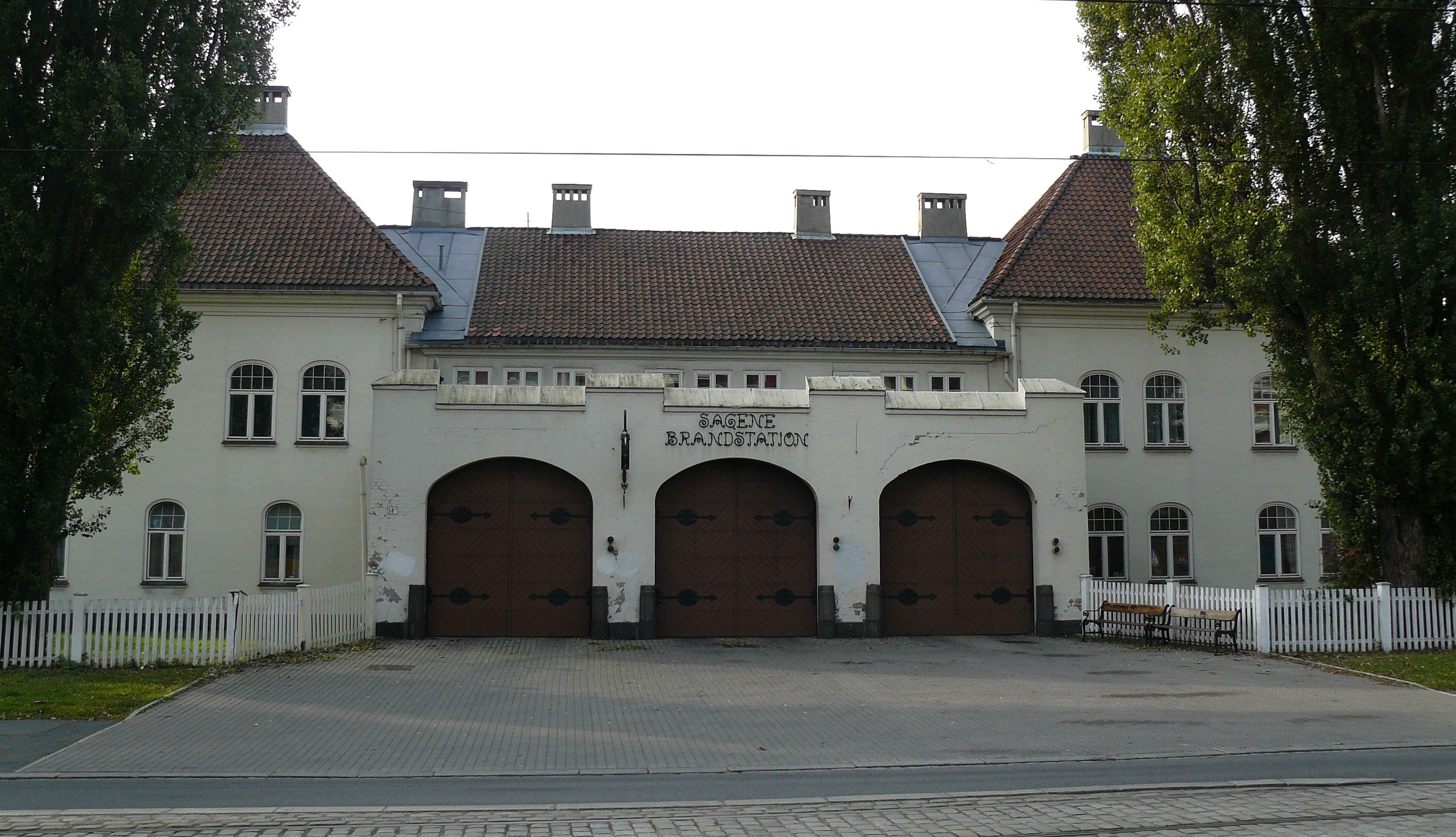 Sagene Brannstasjon (firestation), Oslo